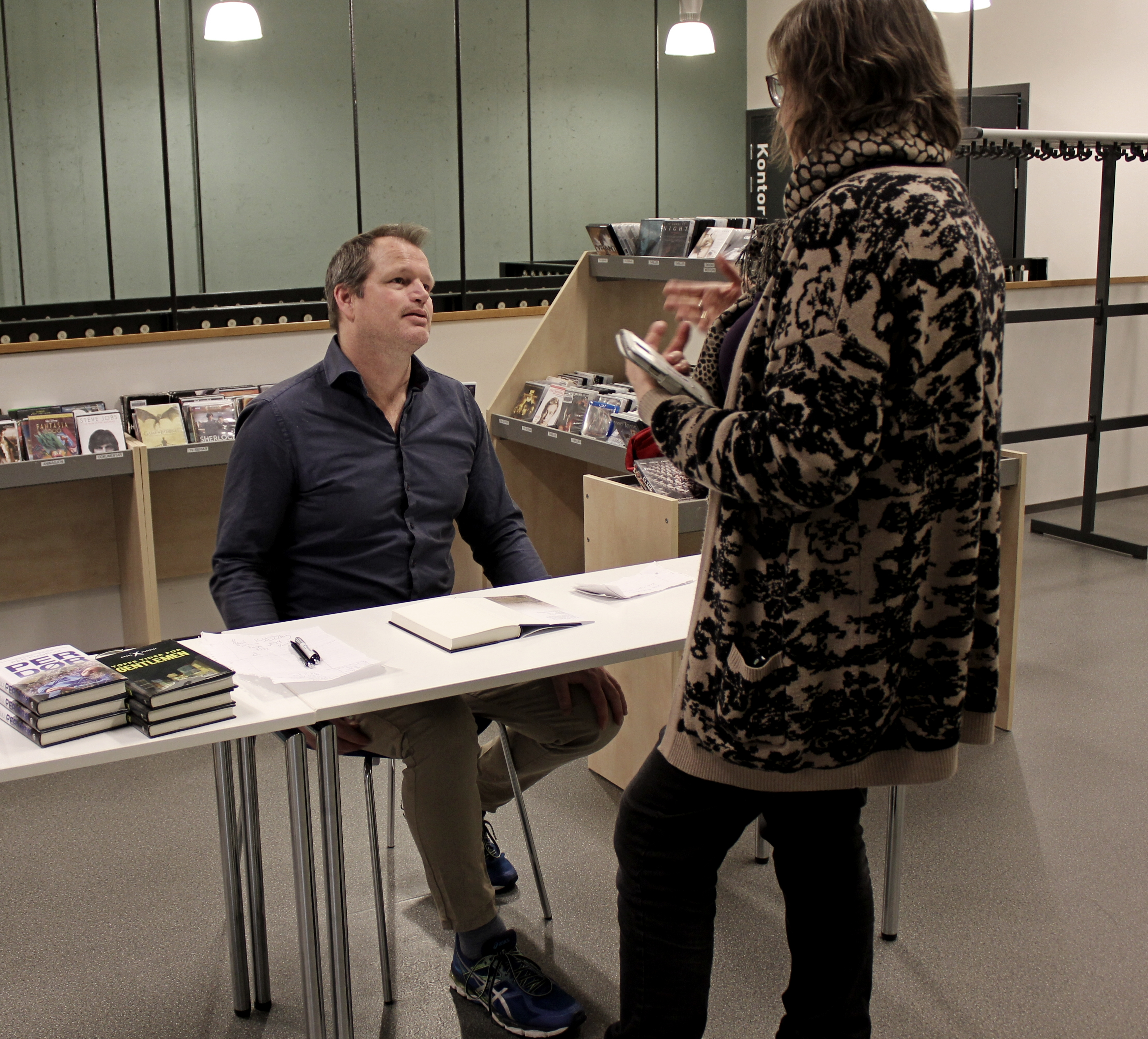 Aksel Fugelli på Garborgsenteret/Time bibliotek i 2017.